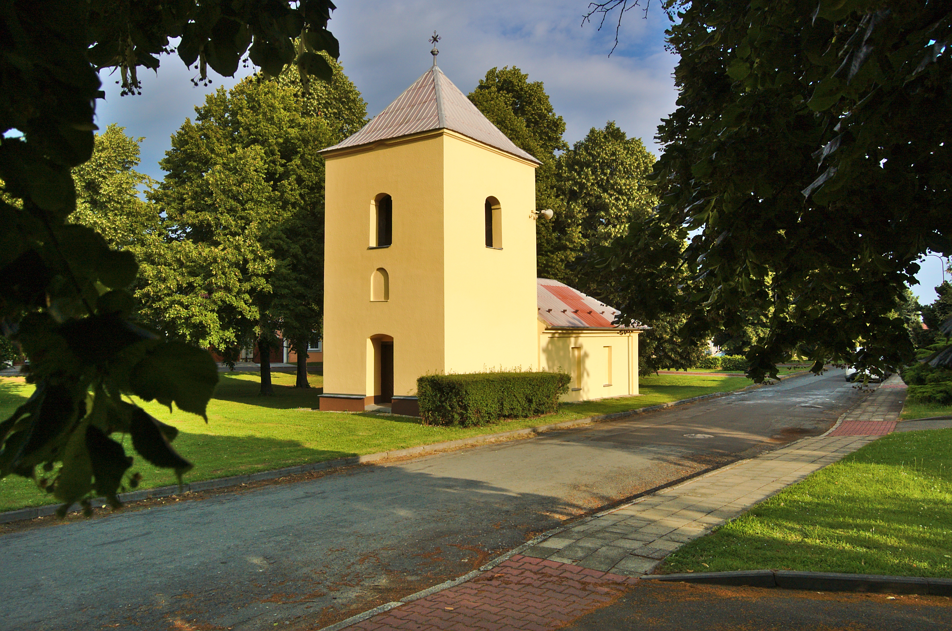 Hasičská zbrojnice s věží, Věrovany, okres Olomouc